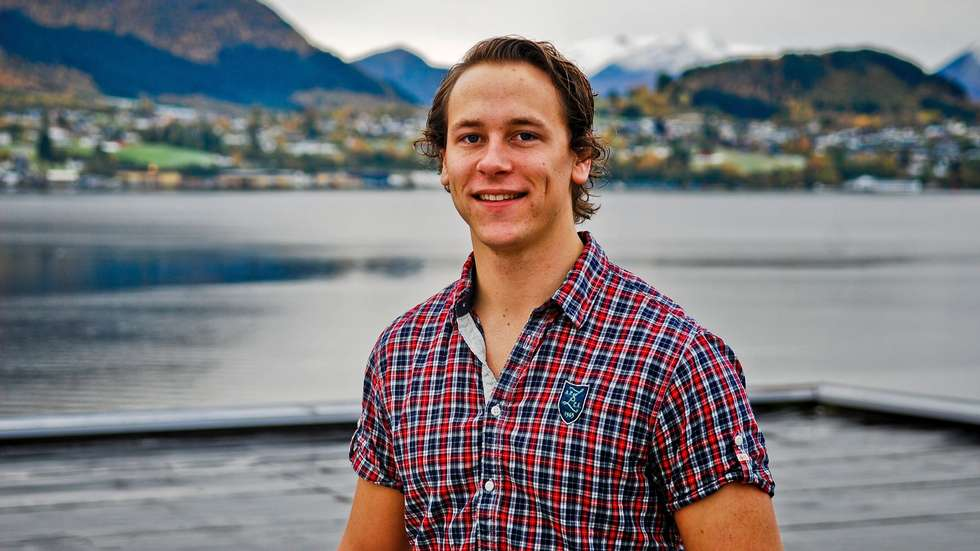 Fredric Holen Bjørdal (2012)